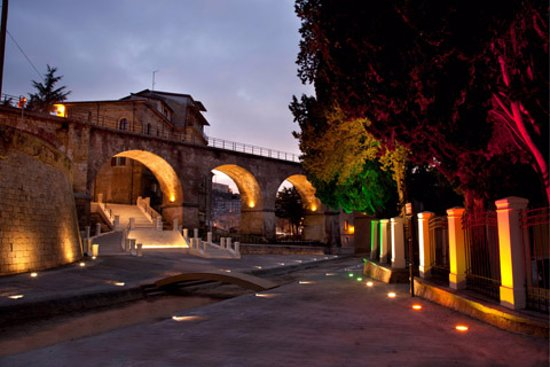 Ara dei Fratelli Bandiera nel Vallone di Rovito nel centro storico di Cosenza